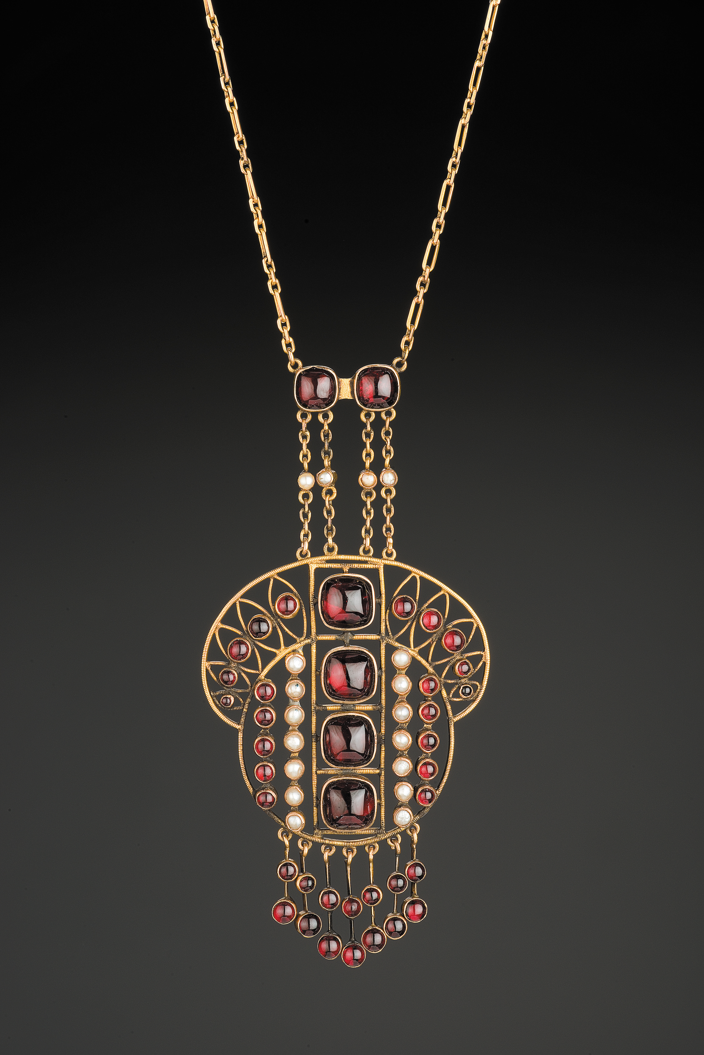 Marie Křivánková (návrh), Pavel Vávra (provedení), Náhrdelník, po r. 1910, Uměleckoprůmyslové muzeum v Praze